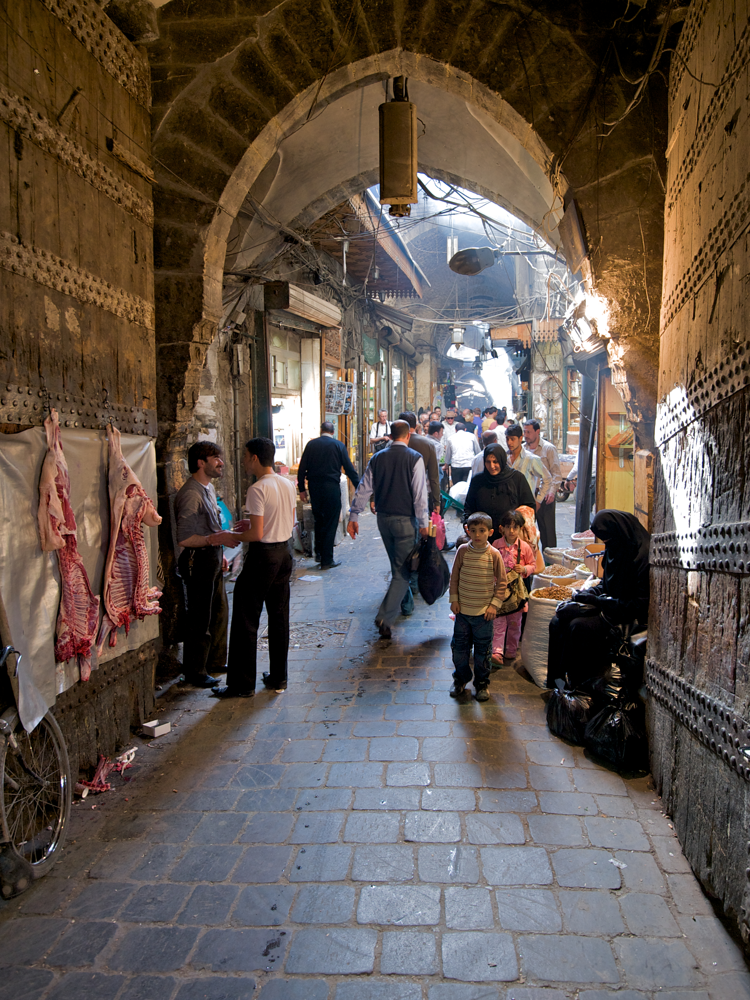 Suq in Aleppo